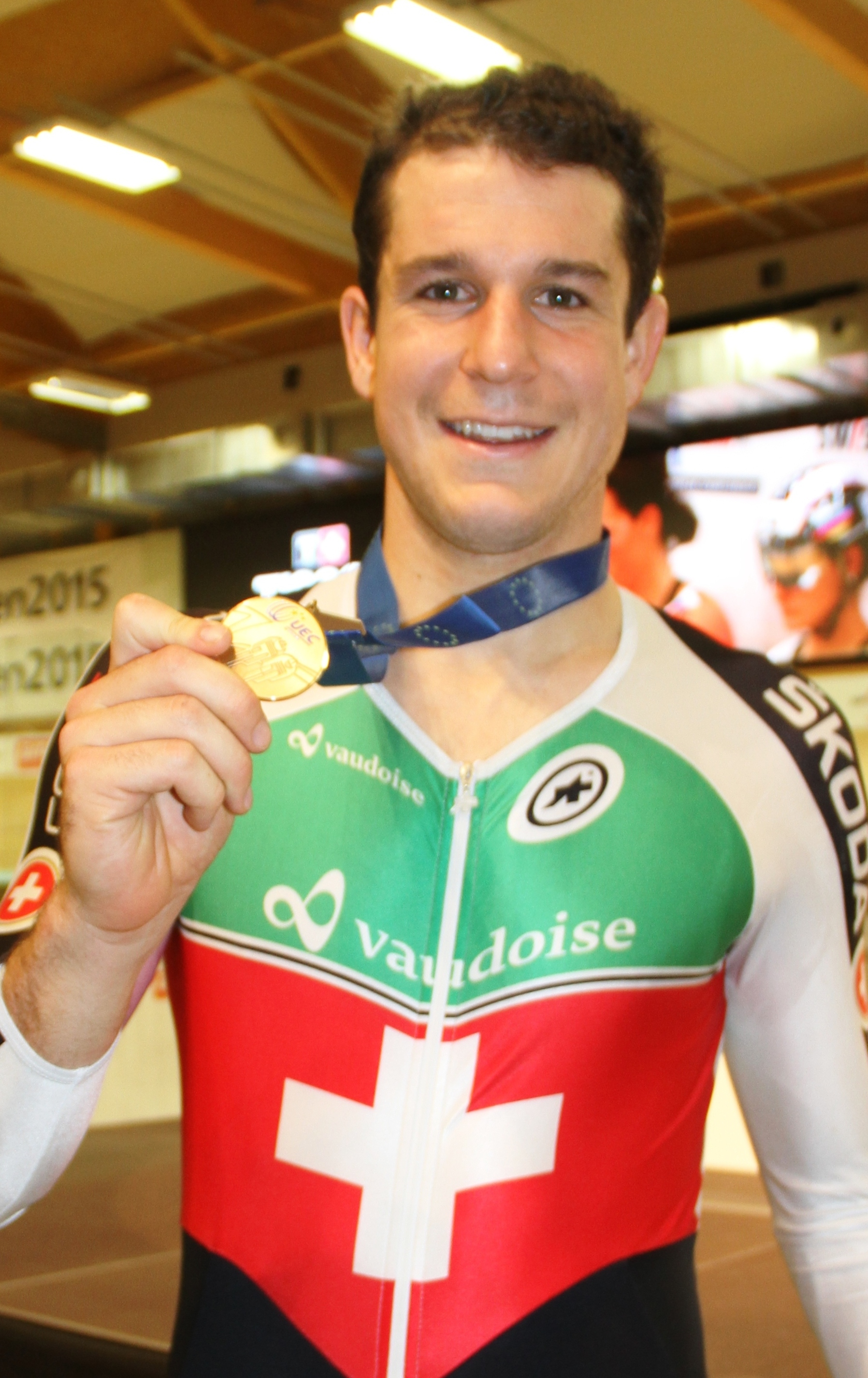 Claudio Imhof, Bronzemedaille im Punktefahren The making of this document was supported by the Community-Budget of Wikimedia Germany.